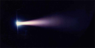 MPD plume